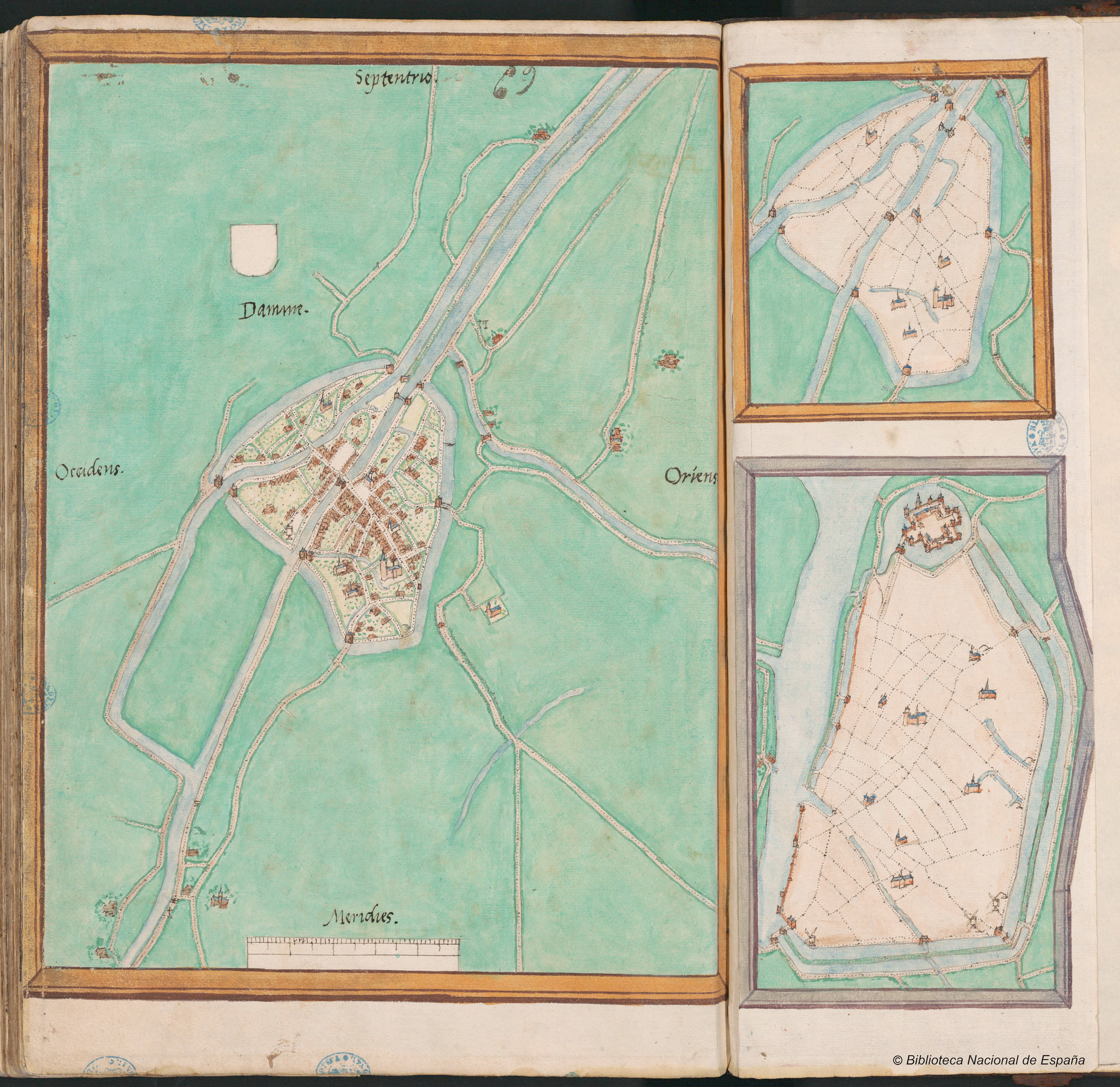 Netkaart van Damme, met bijkaartjes van Damme & Sluis